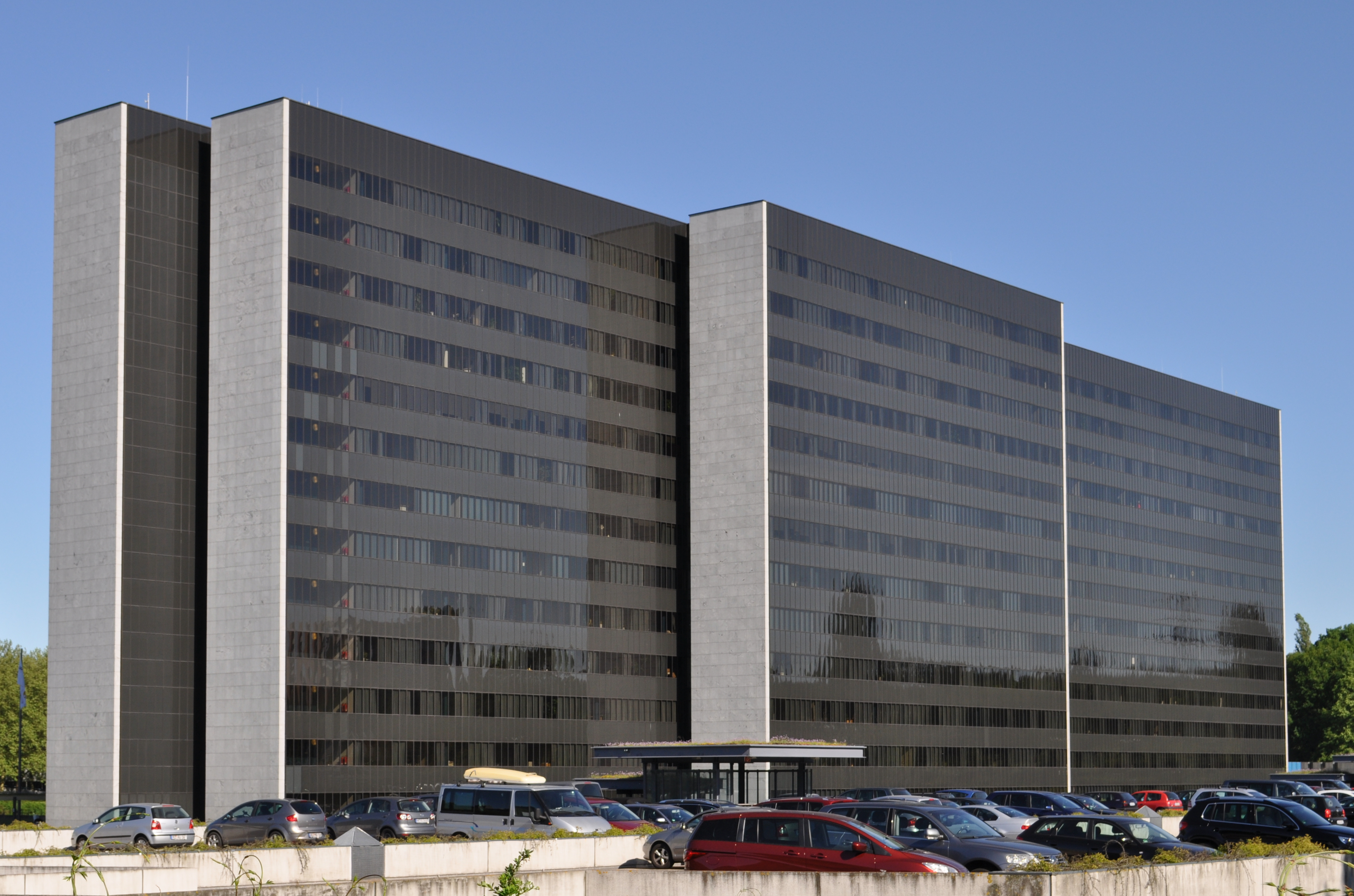 Verwaltungsgebäude von Vattenfall in der City Nord in Hamburg-Winterhude.